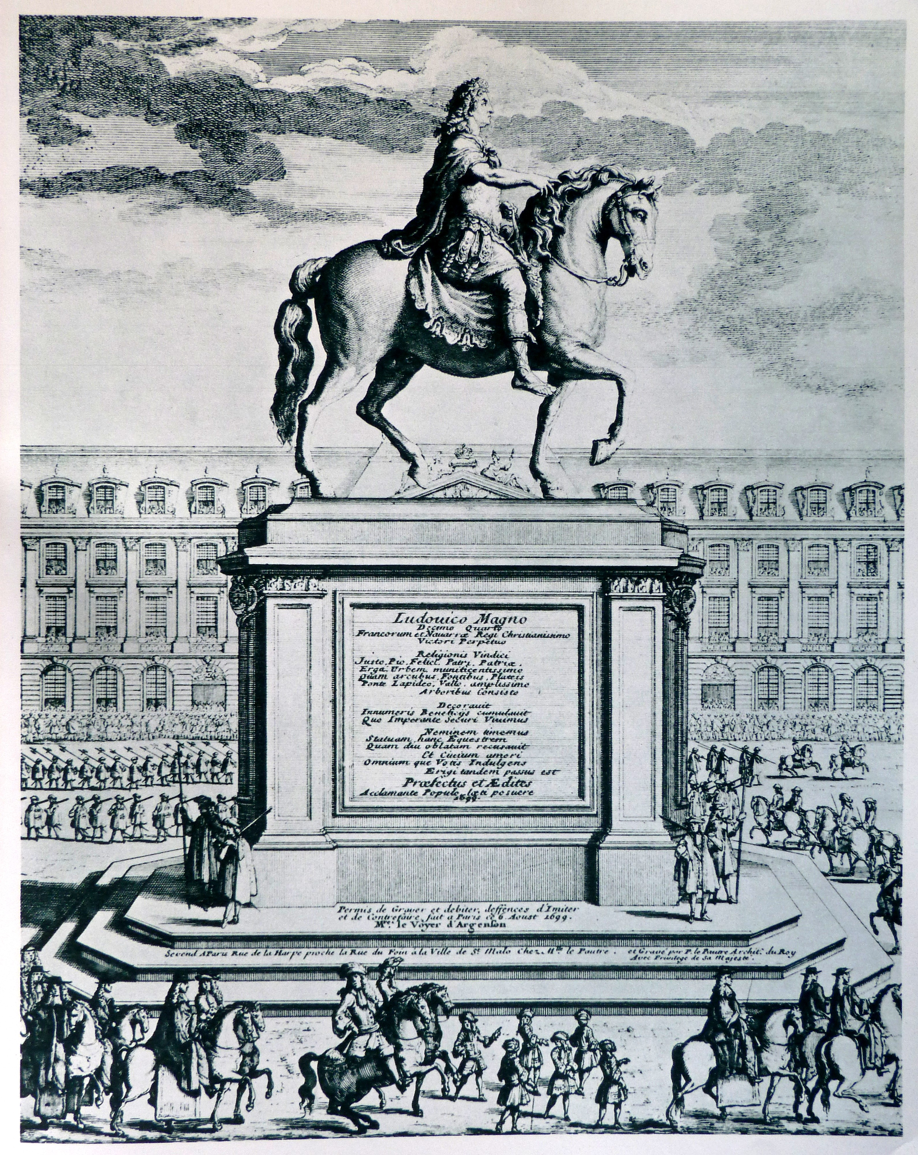 Inauguration de la statue équestre de Louis XIV, le 13 août 1699, sur la place Louis Le Grand (aujourd'hui place Vendôme, statue détruite en 1792) - Eau forte de Pierre Lepautre, architecte du Roi.